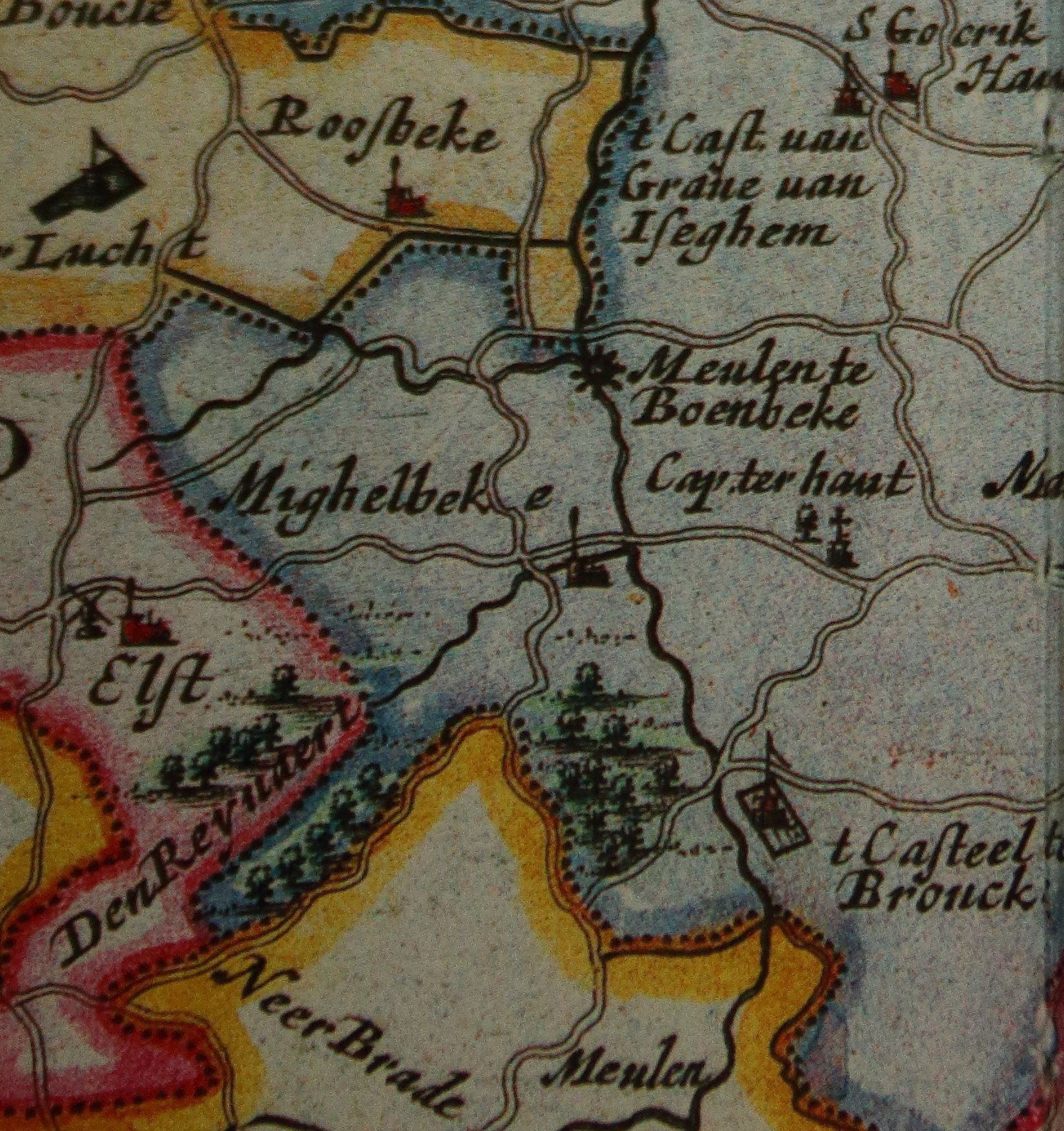 'Meulen te Boembeke', Atlas Maior, Joan Blaeu, 1665.